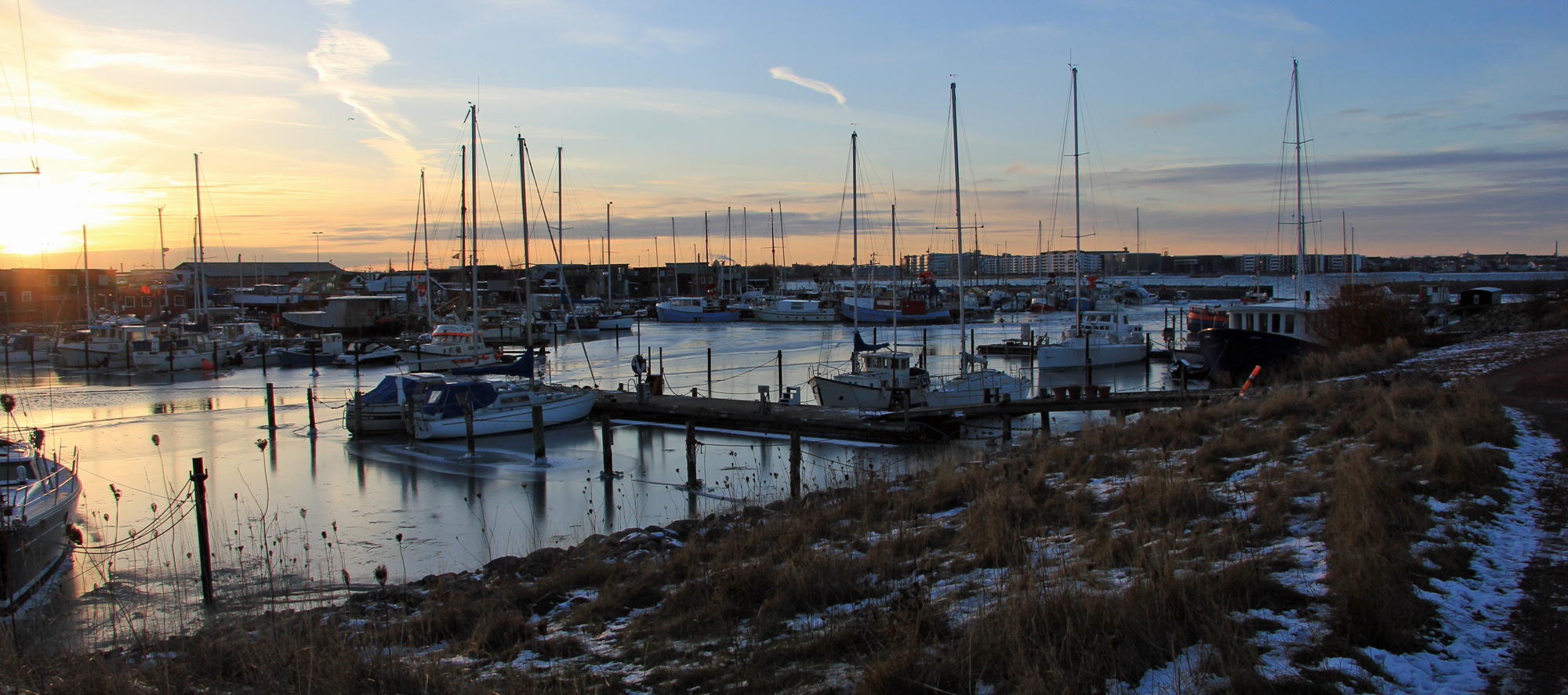 Fiskerihavnen yderst i Nordhavnen er hjemsted for både erhvervsfiskere og lystsejlere.